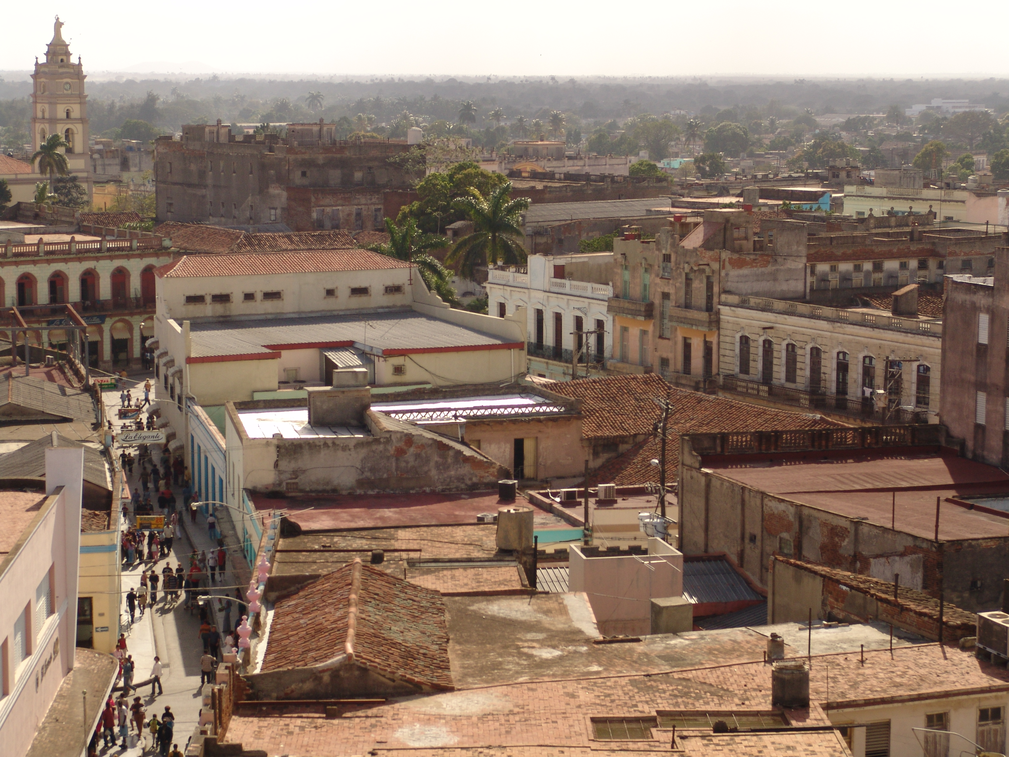 Calle Maceo de Camagüey. Rooftops of Camagüey and Maceo street. I took the picture.